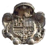 Escudo de la Casa de la Panadería de la Plaza Mayor de Madrid.